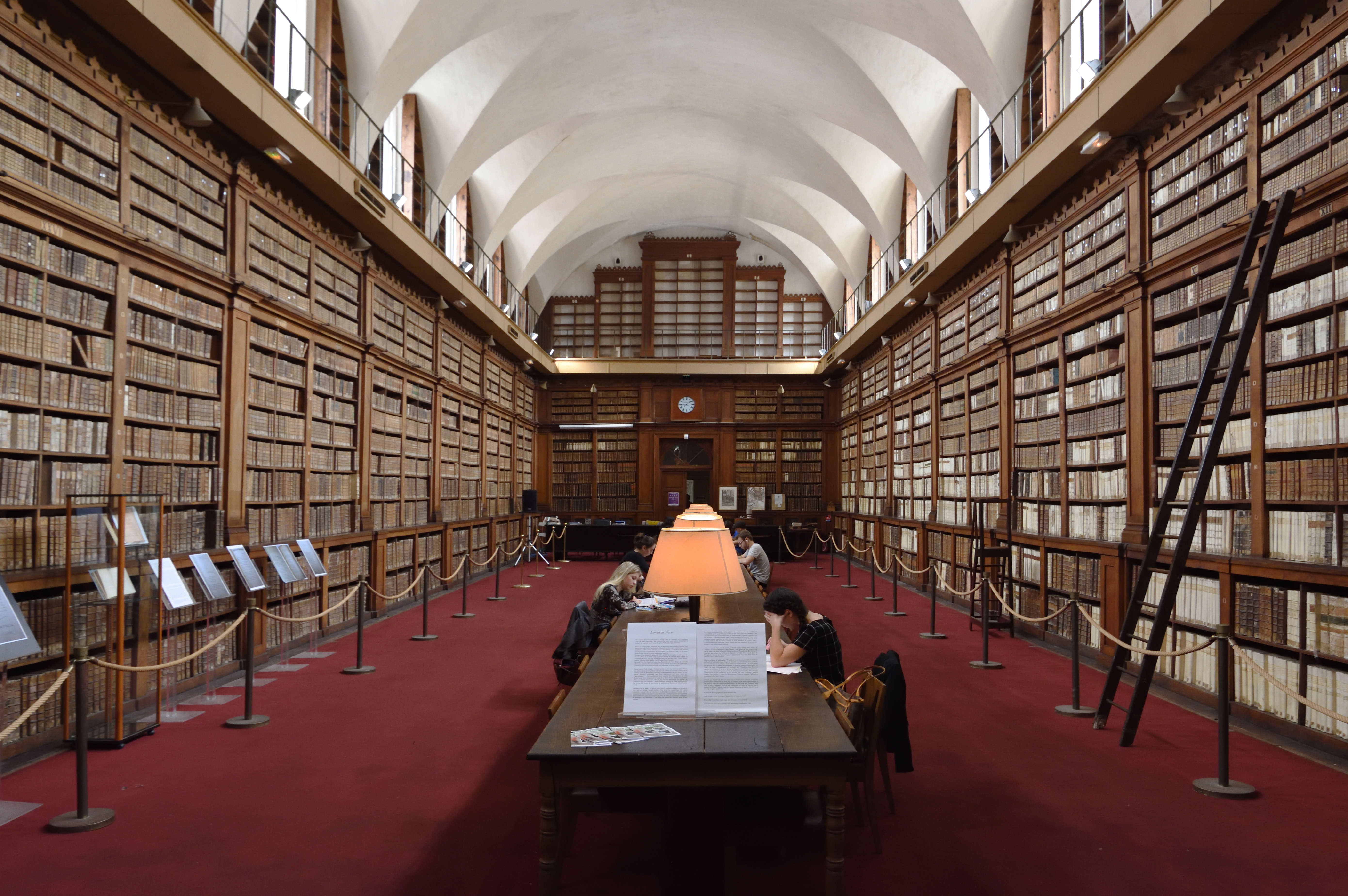 La bibliothèque municipale à Ajaccion en Corse, fondée par Lucien Bonaparte en 1801, dans l`aile nord du palais Fesch depuis 1868